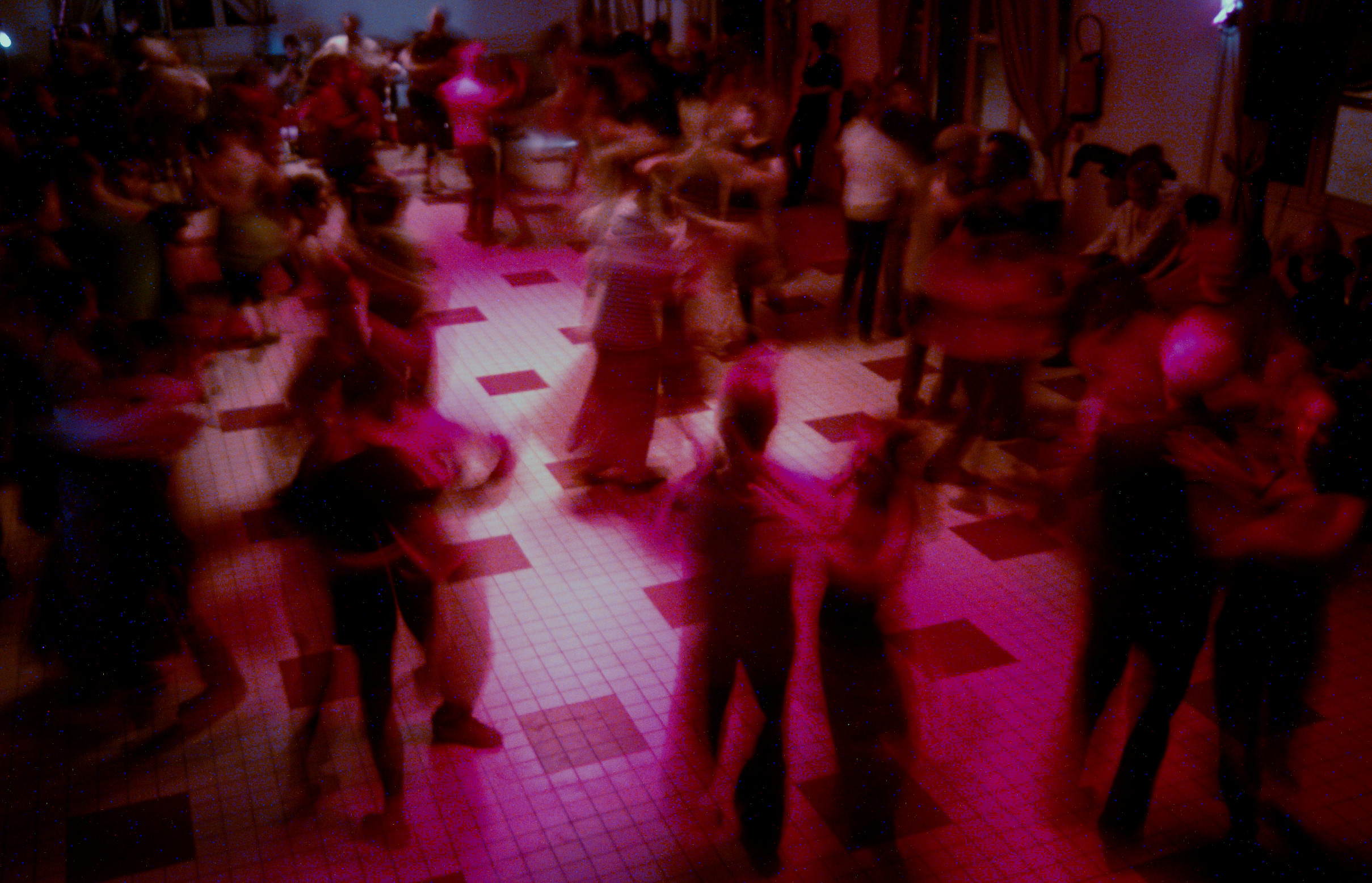 BalFolk à Avignon à la Souvine, organisateur : balDesPasAmoureux 4 décembre 2015